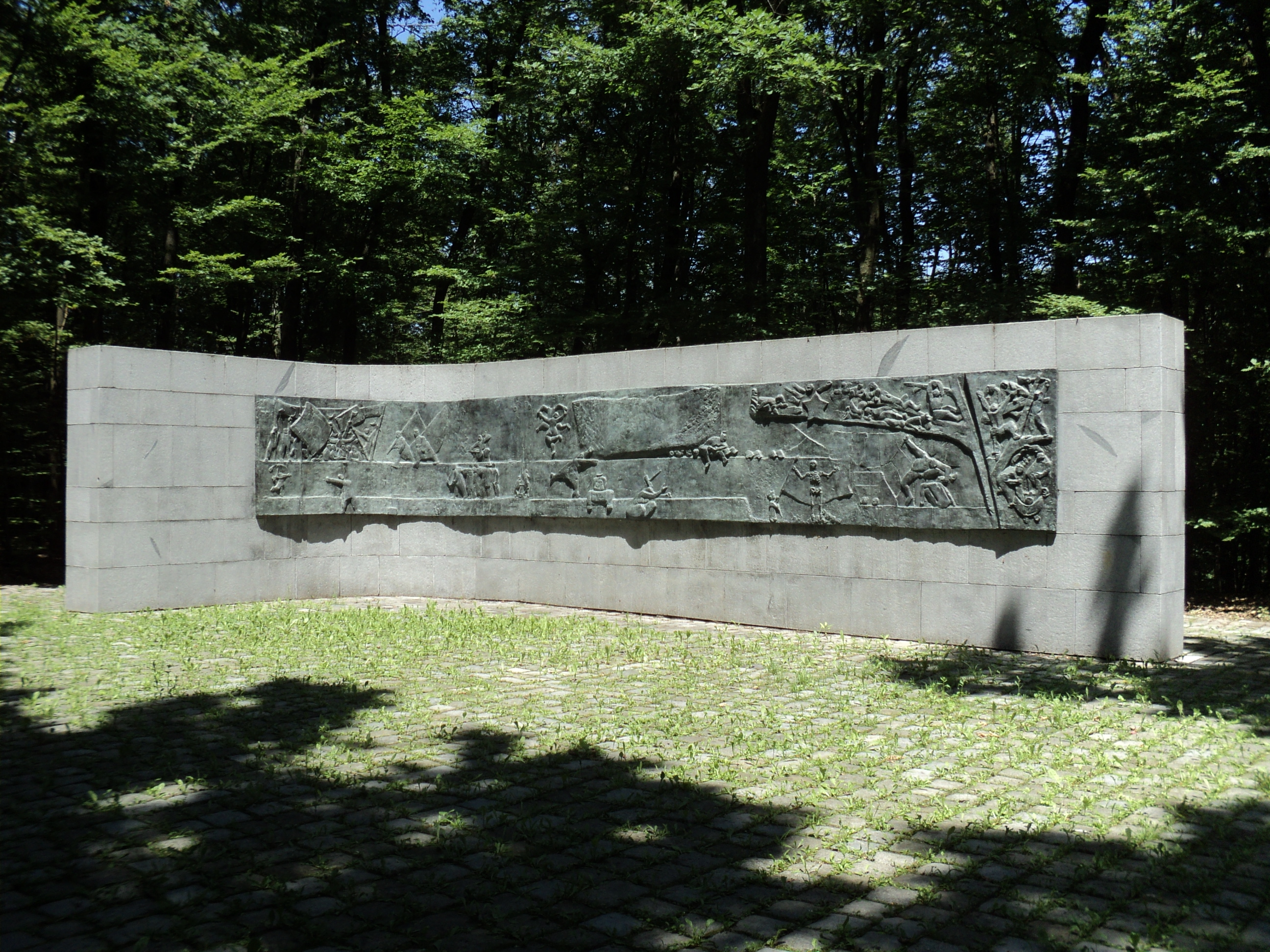 Spomenik Zagrepčanima poginulima u NOB-u, spomen-područje Dotršćina. Self-made. Jun 2011.